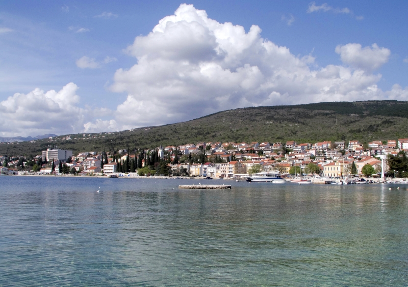 Selce, Hotel Varaždin